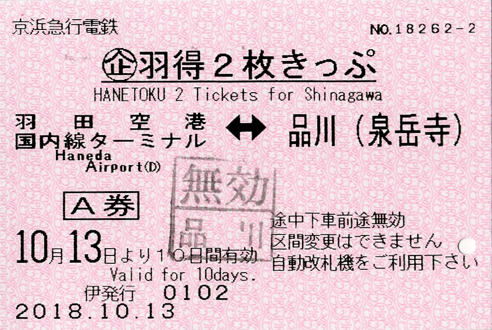 京浜急行電鉄 羽得2枚きっぷ A券